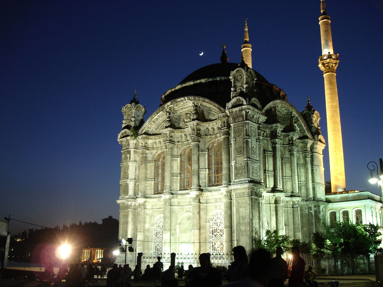 Esterno della moschea di Ortaköy, a poca distanza da Istanbul, capolavoro dello stile soprannominato "barocco" dell'architettura ottomana. Foto di: Giovanni Dall'Orto, 30-5-2006.